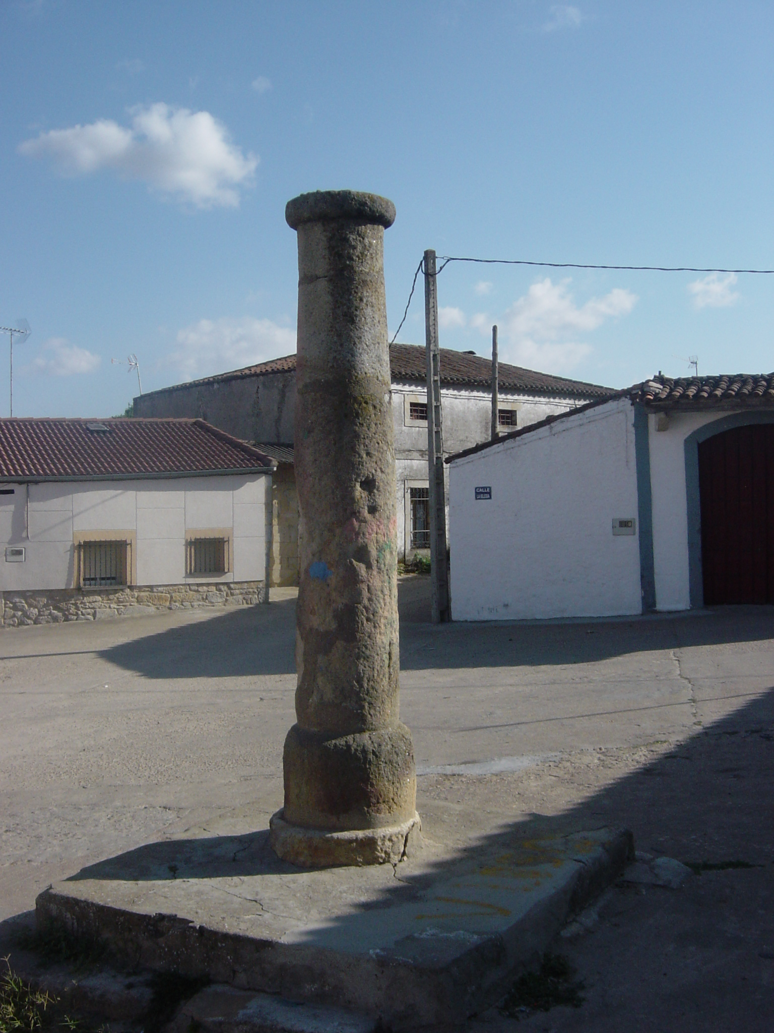 Rollo de Peñausende, municipio español de la provincia de Zamora.